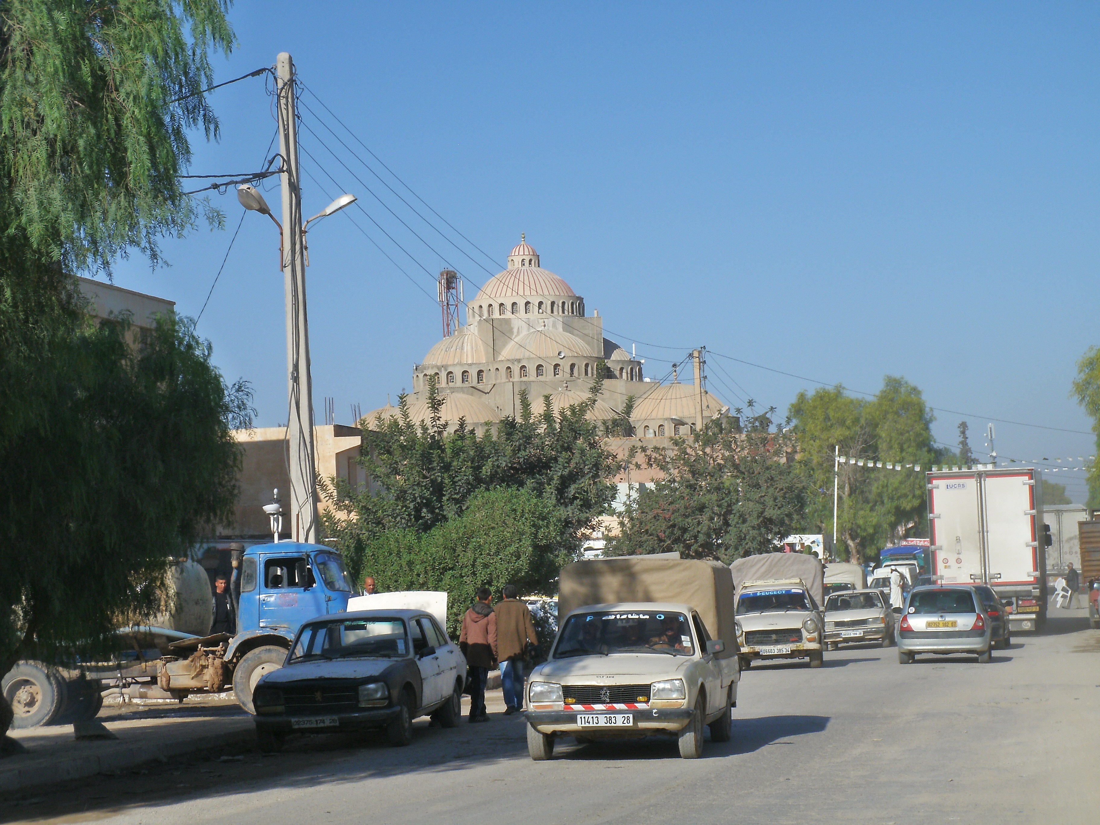 Aïn el Hadjel dans la wilaya de M'Sila